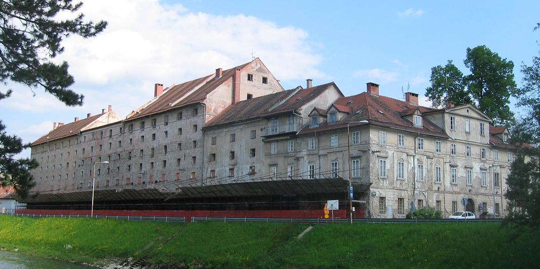 Cukrarna, Ljubljana photo:Ziga 17:59, 7 May 2006 (UTC)